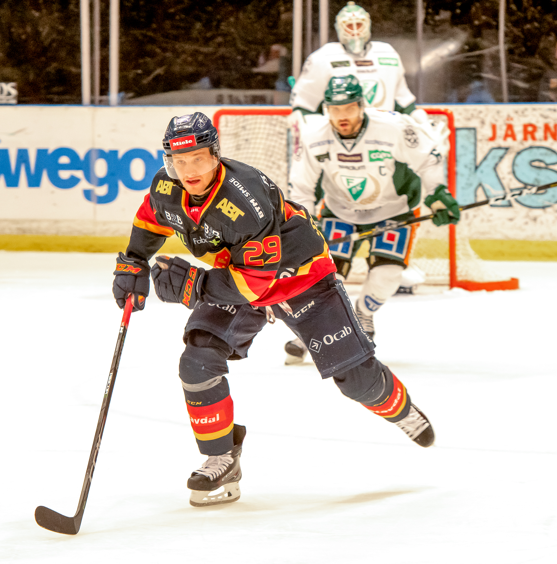 Djurgården-Färjestad 20190129